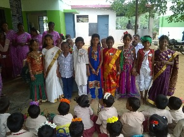 குடியரசு நாள் கொண்டாட்டம்